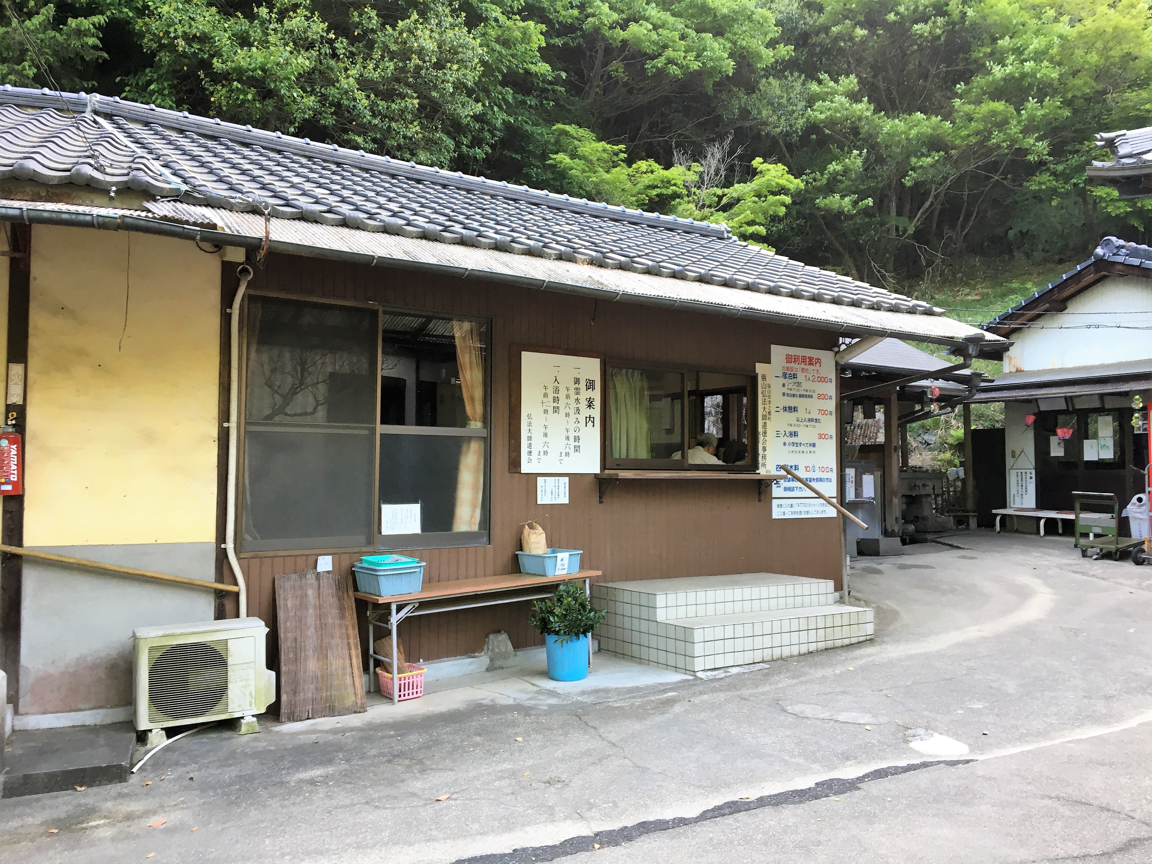 俄山弘法大師堂の受付